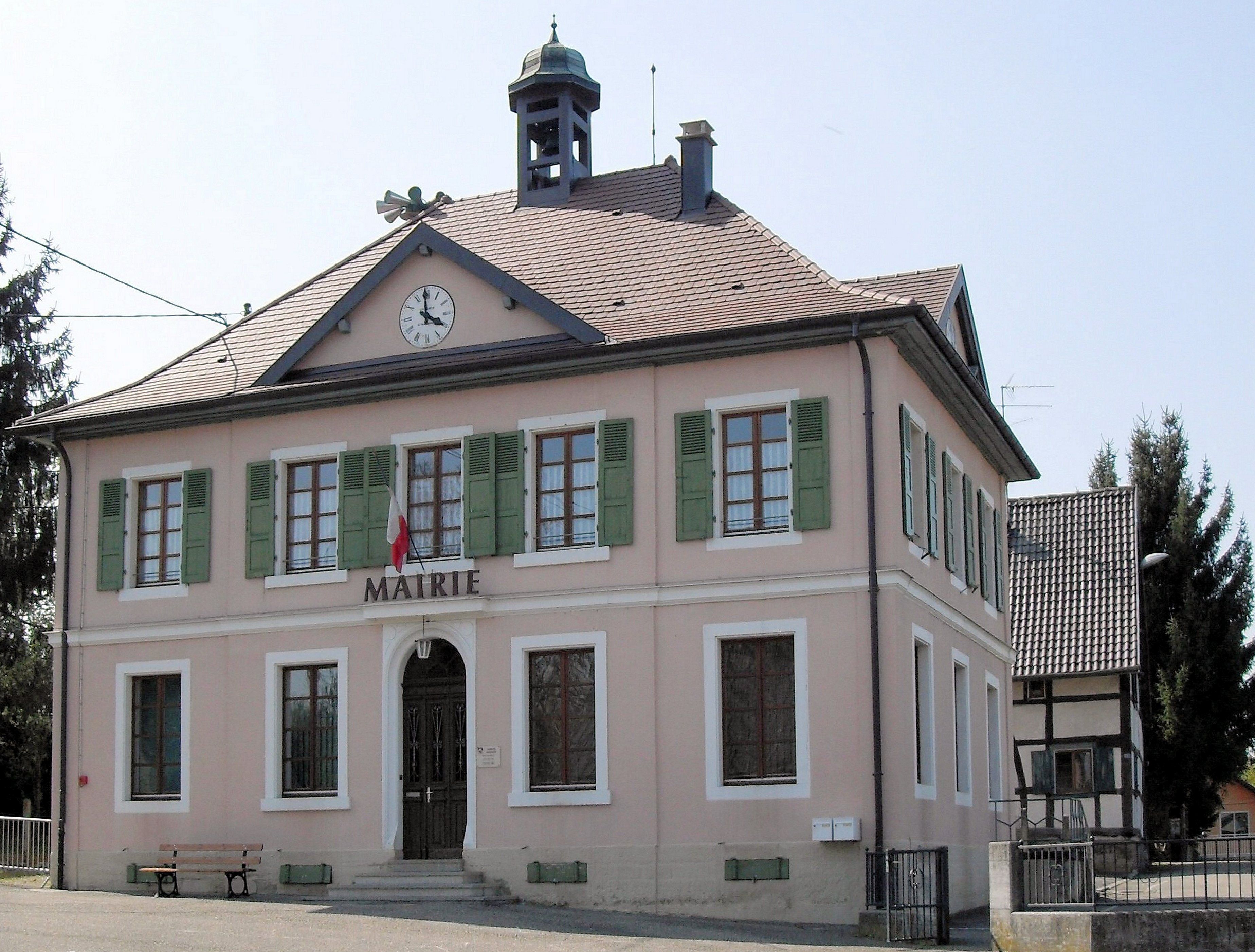 La mairie de Hausgauen